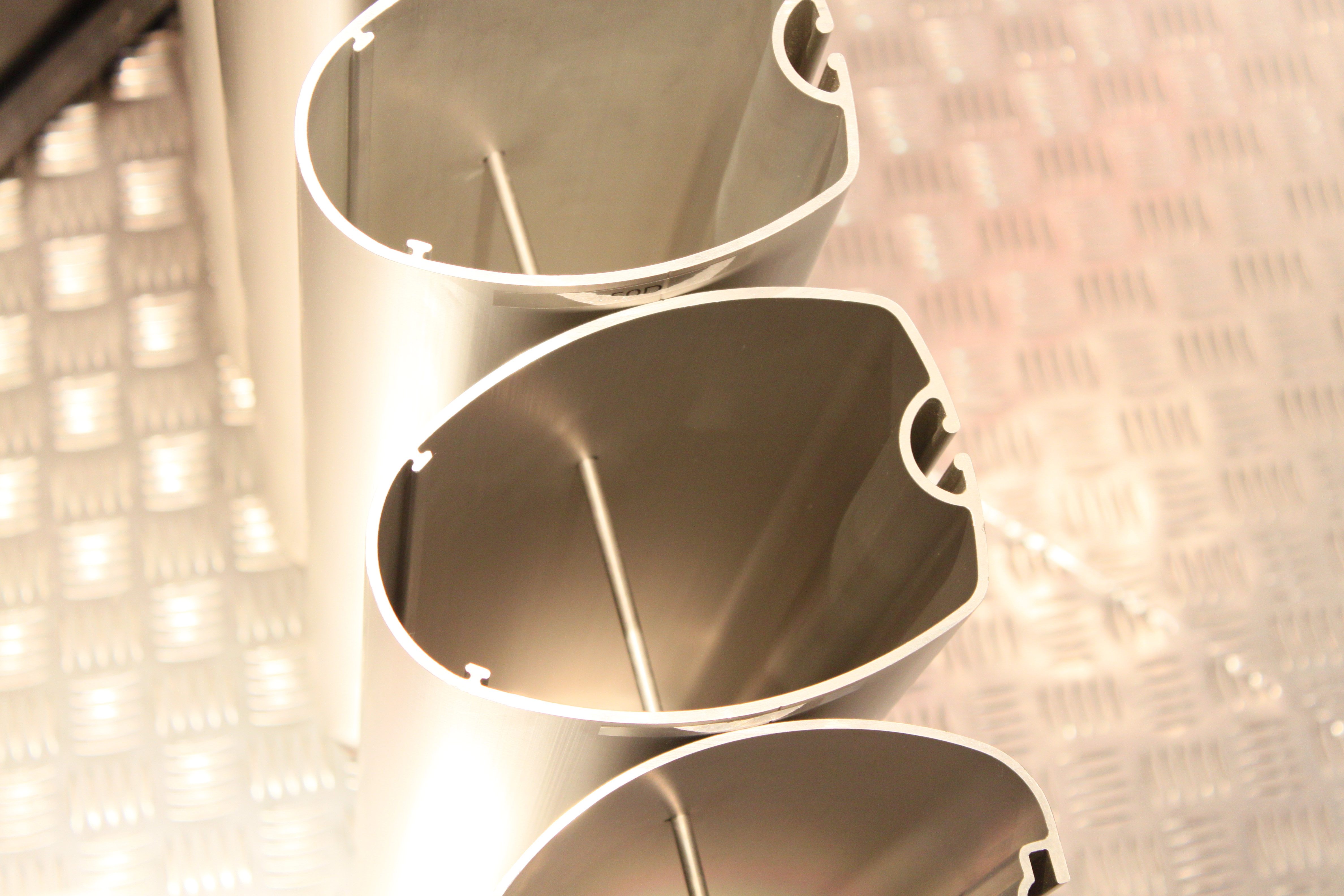 Schiffsmasten, verschiedene Profile, gesehen auf der Messe Bremen "Boot 2011"